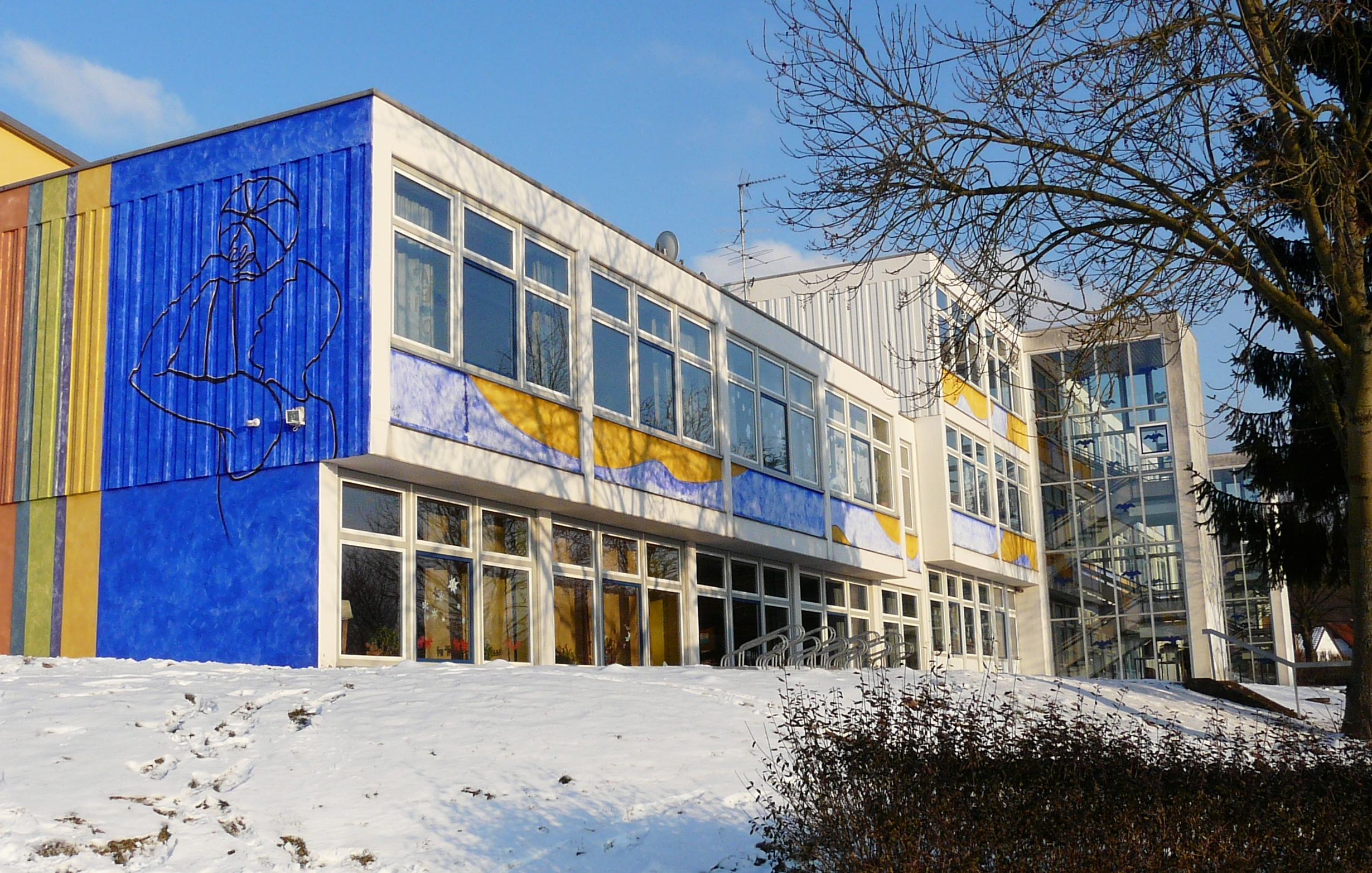 Goldkronach, Alexander-von-Humboldt-Schule, Volksschule